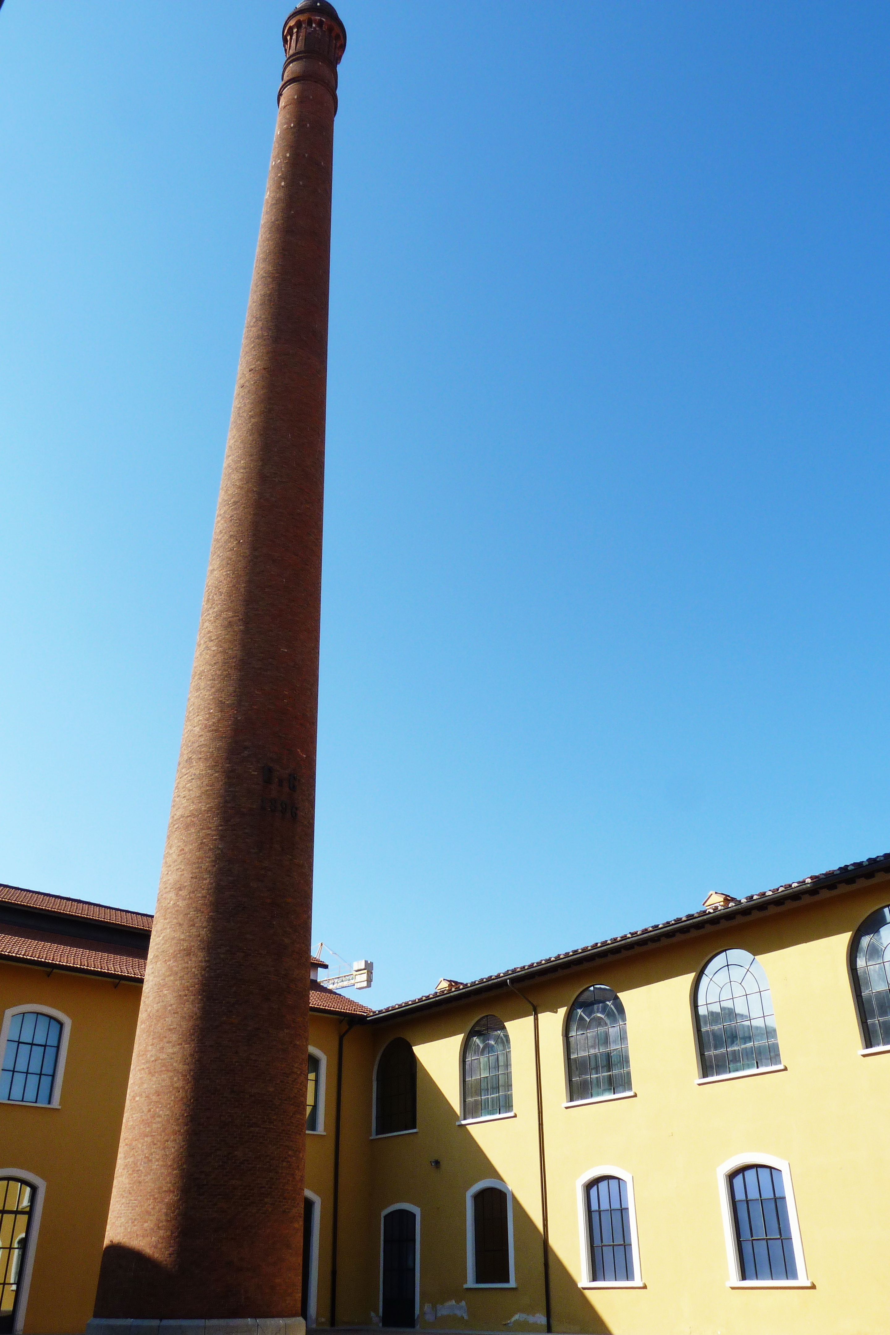 Museo del Tessuto (ex fabbrica Campolmi), Prato, Toscana, Italia This is a photo of a monument which is part of cultural heritage of Italy.